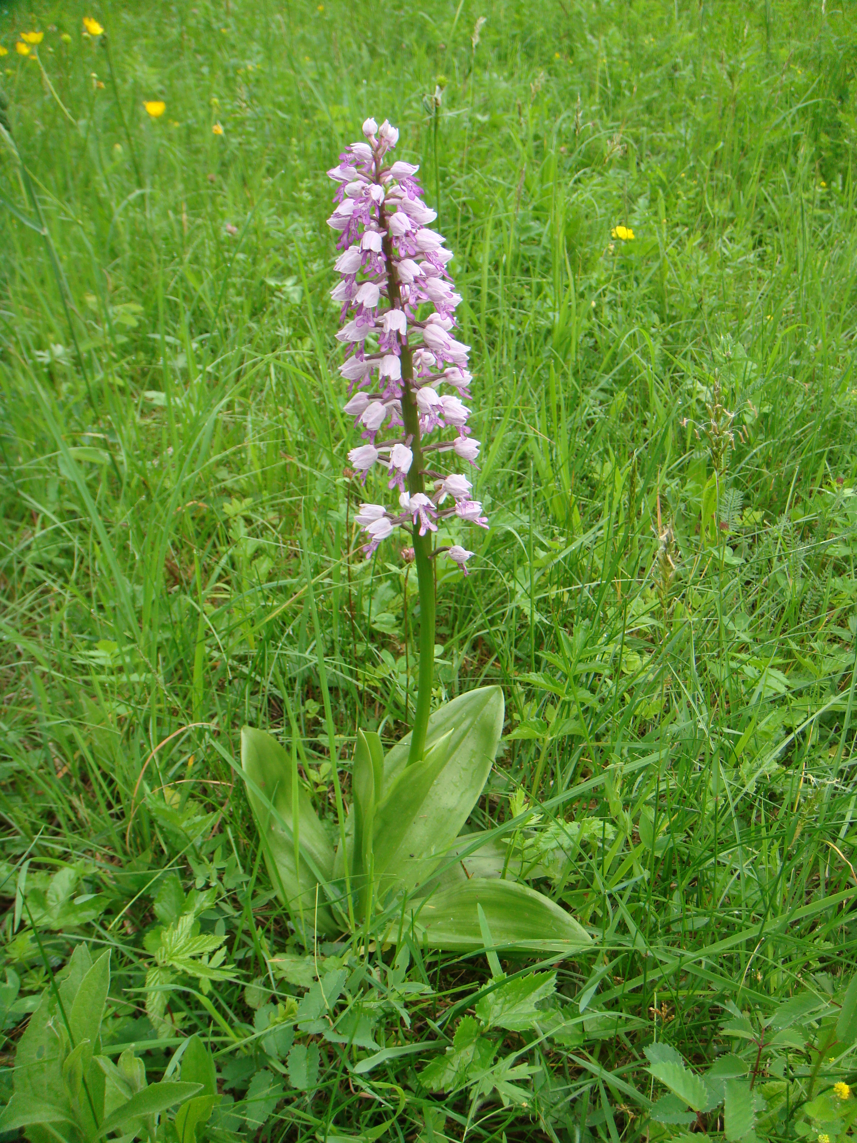 Helmknabenkraut Orchis militaris bei Flußkilometer 16,5 an der Iller.